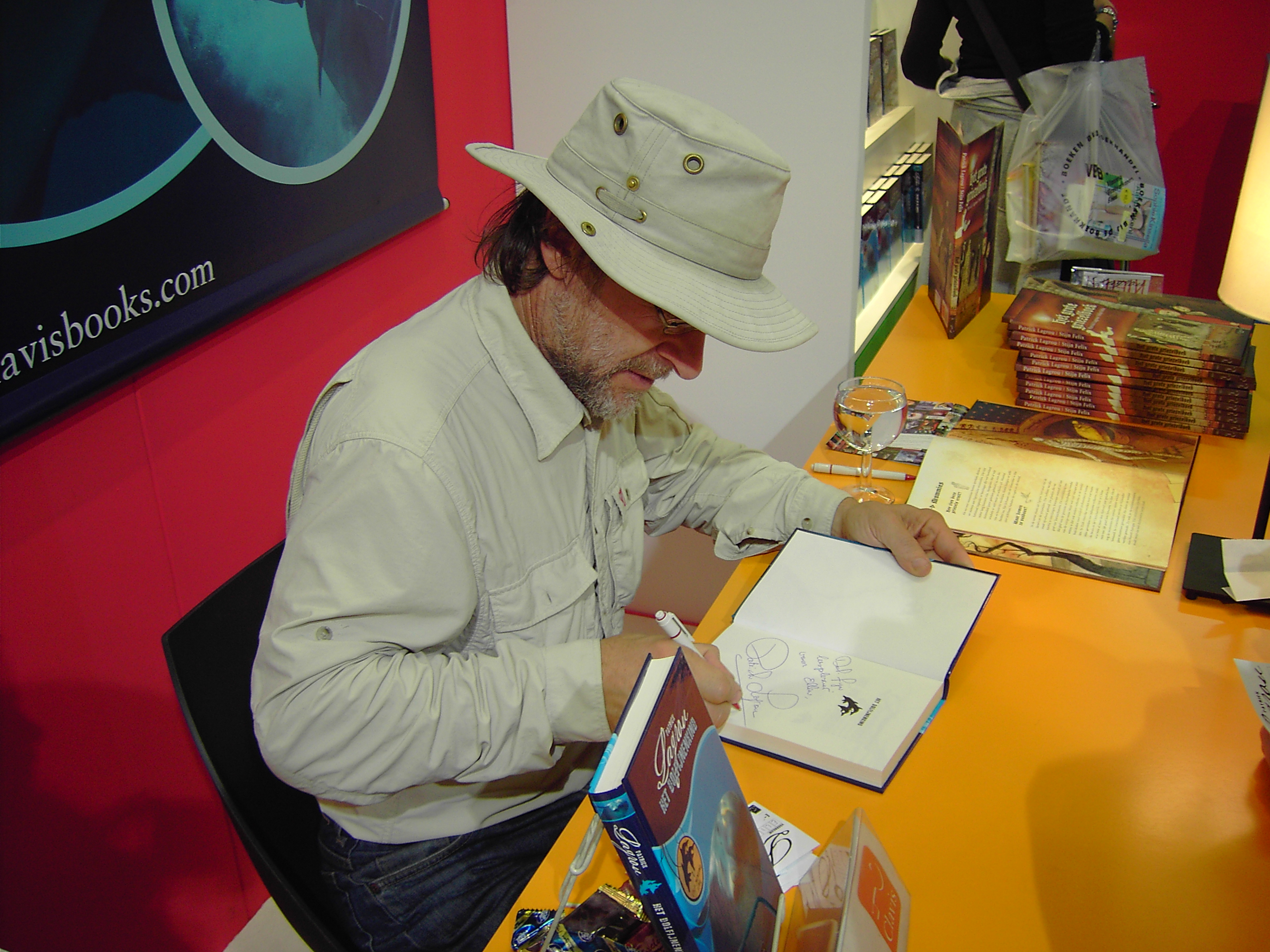 Patrick Lagrou op de boekenbeurs te Antwerpen